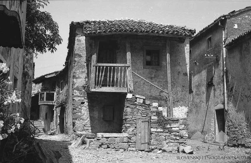 Počkarjeva štala (nekoč hiša), Goče.